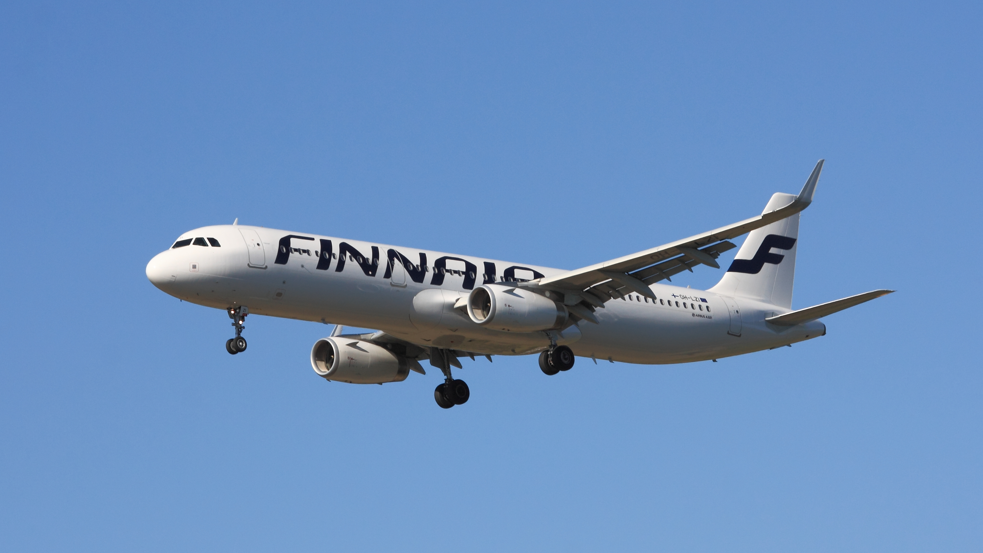 OH-LZI Finnair Airbus A321 landing Helsinki-Vantaa (HEL) rwy 22L